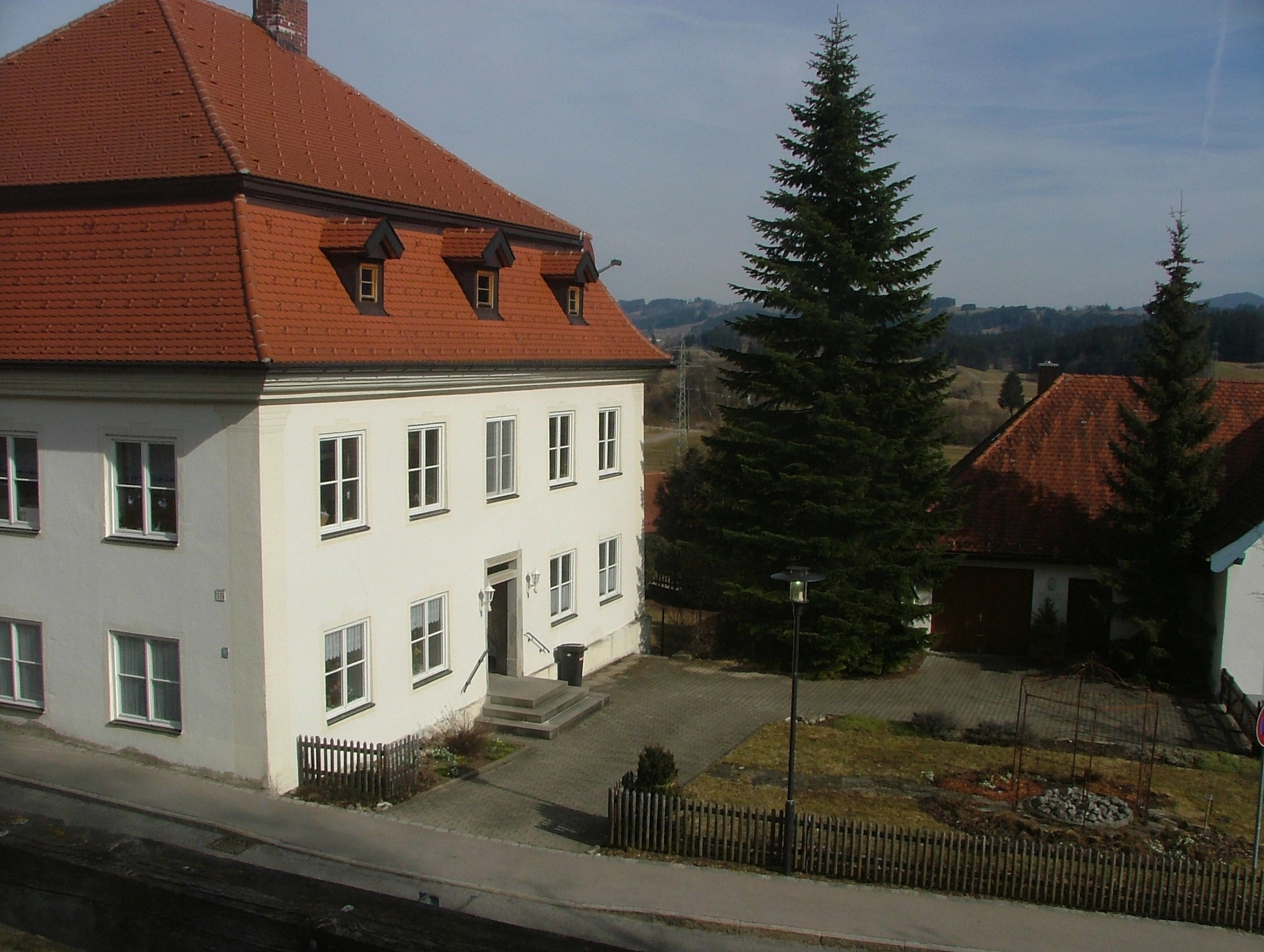 Pfarrhof von Martinszell